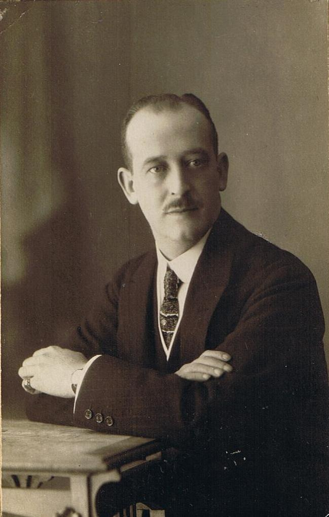 Dr. Celedonio Calatayud